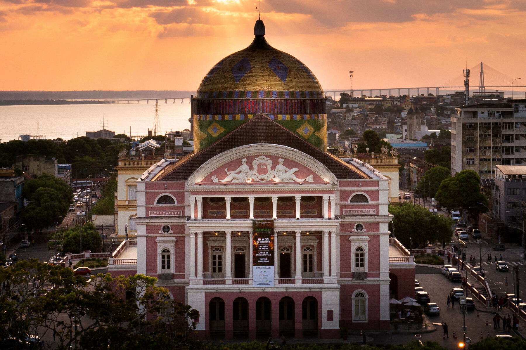 Inaugurado em 1896, o Teatro Amazonas destaca-se pela singularidade arquitetônica, por isso foi tombado como Patrimônio Histórico Nacional pelo IPHAN, em 1966.